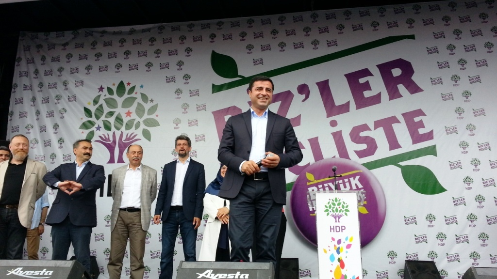 Selahattin Demirtaş, Hüda Kaya, Turgut Öker, Sezai Temelli, Garo Paylan, Abdullah Levent Tüzel